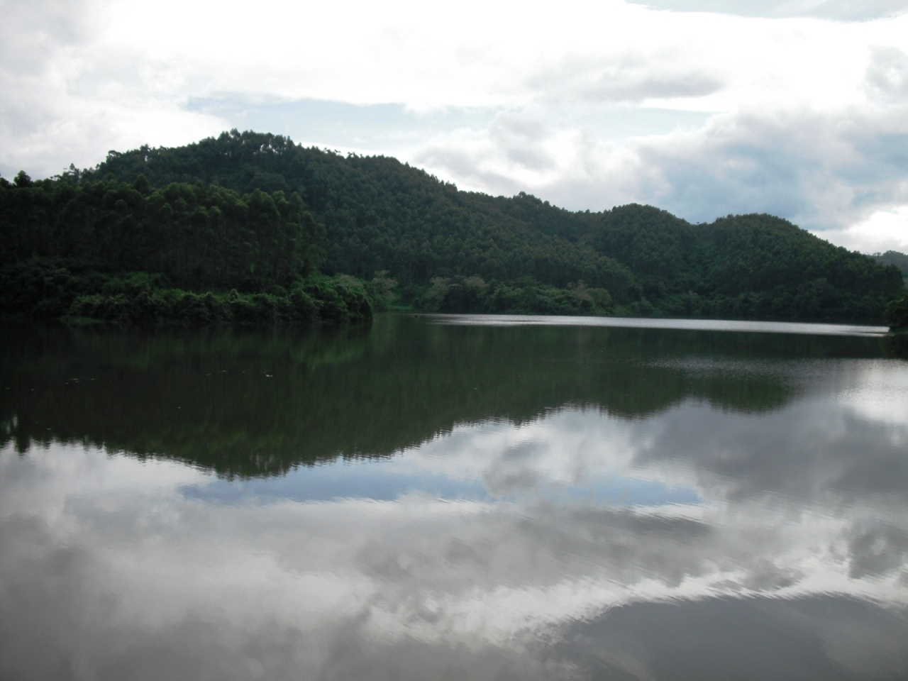 Chengulam Dam, Idukki